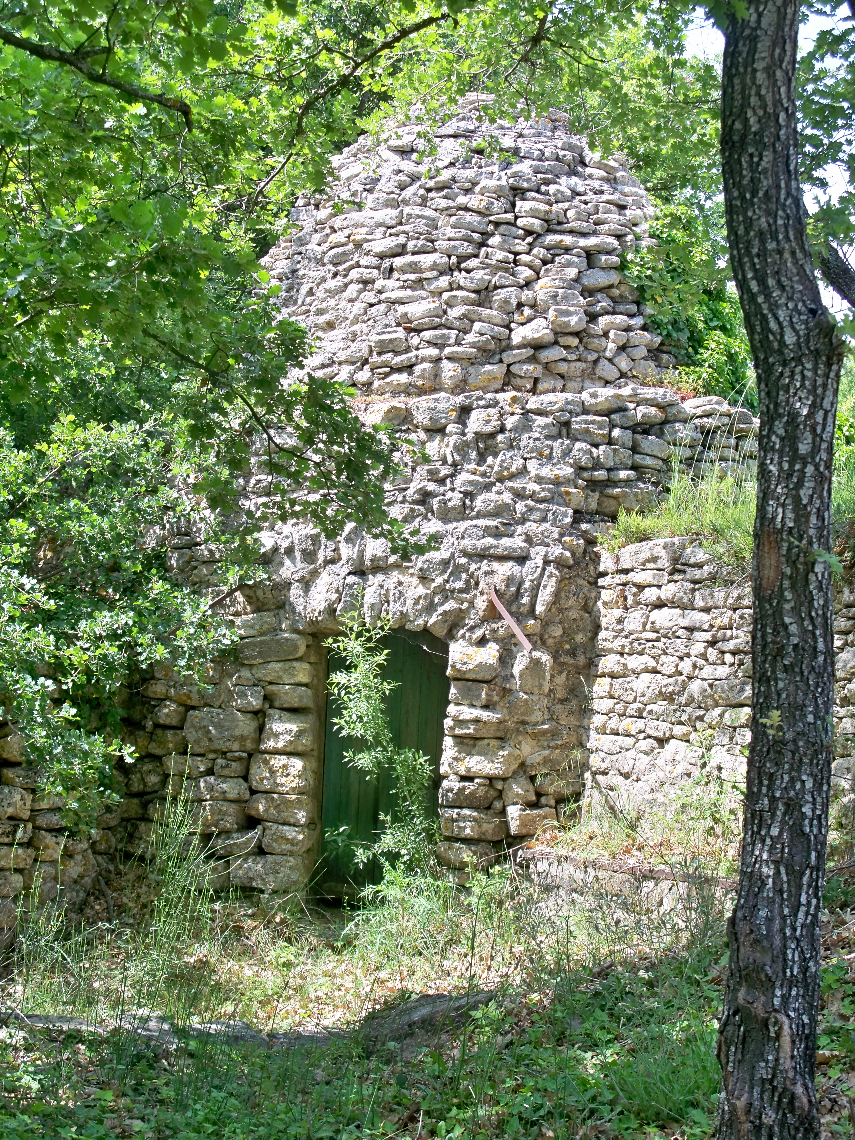 Borie intégré à des restanques, Près de Saint Martin de Castillon, Vaucluse, France